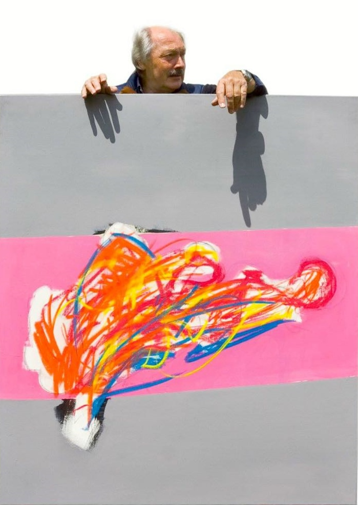 Hans-Joachim Sternhardt, Hinweis zum Bild